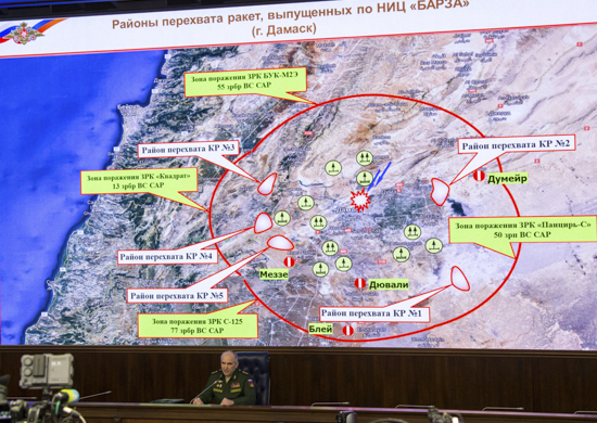 Брифинг Начальника Главного оперативного управления Генерального штаба Вооруженных Сил РФ генерал-полковника Сергея Рудского для журналистов по ситуации в Сирии. Представлен анализ ракетного удара по Сирии, совершенного в ночь с 13 на 14 апреля международной коалицией США, Великобритании и Франции